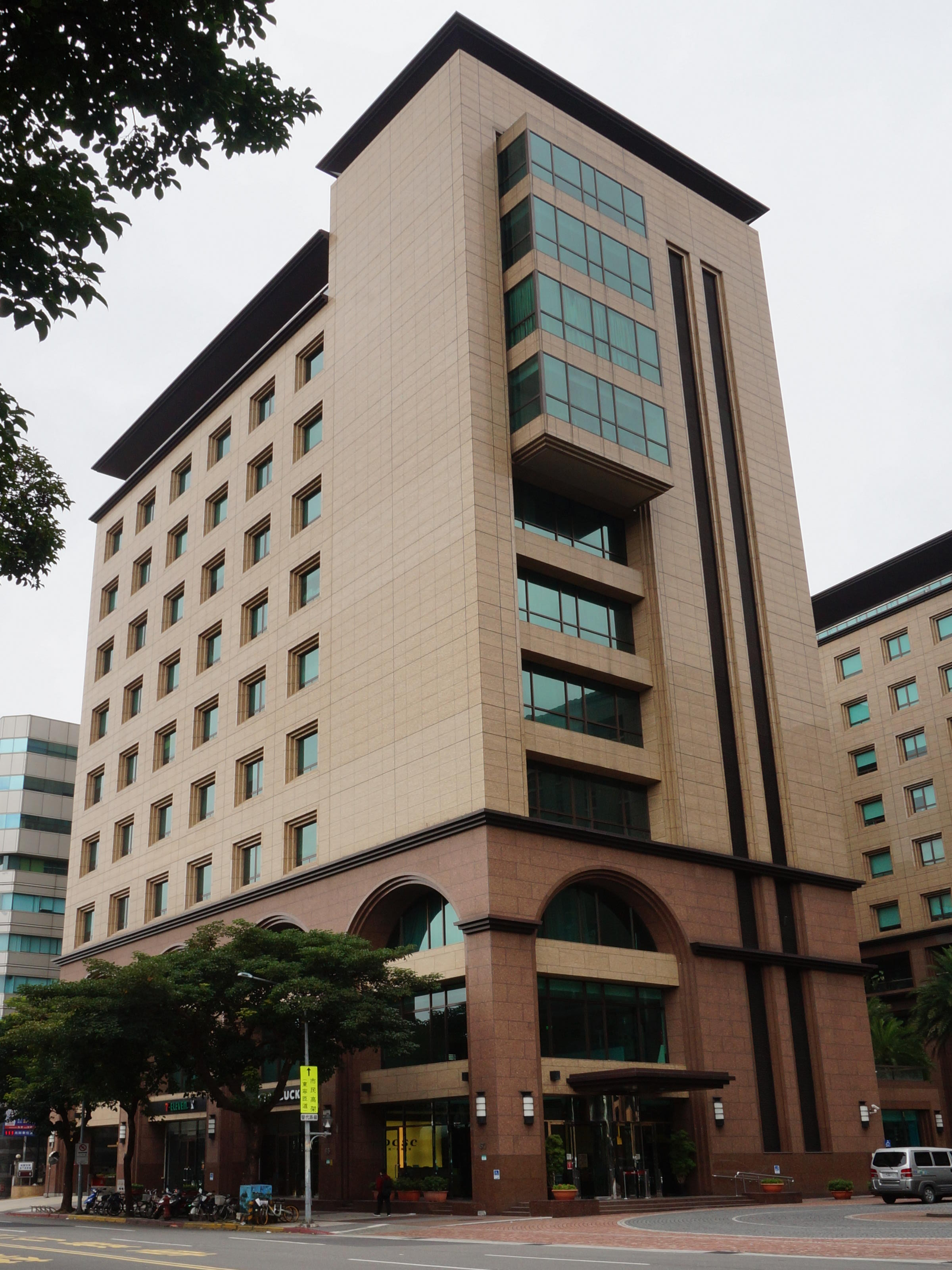 中文（台灣）: 統一超商大樓，是統一超商總部，地址：臺北市信義區東興路65、67號。